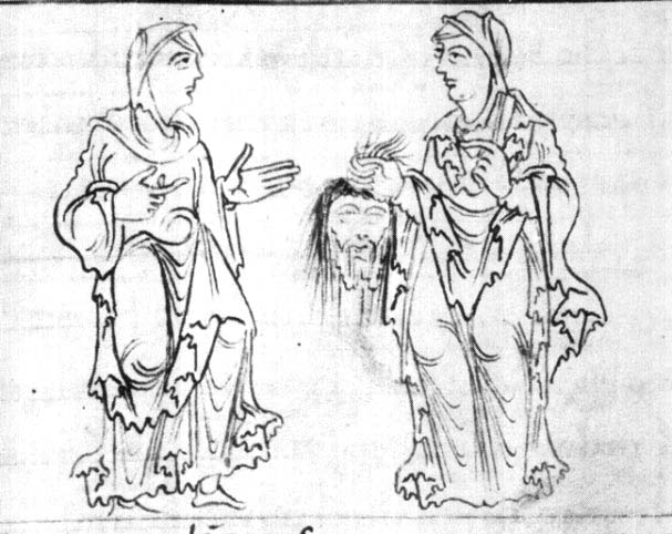 London, Bristish Library MS Cotton Cleopatra C. VIII, Canterbury, Christ Church f17: Humilitas, veiled, holds Superbia's severed head by the hair; Spes, veiled, standing on the left, upbraids the dead Vice. Die Demut praesentiert den abgeschlagenen Kopf der Ueberheblichkeit. Auf der linken Bildseite die Hoffnung, die das tote Laster zurechtweist. Illuminierte Handschrift des 8. Jh.s n. Chr.